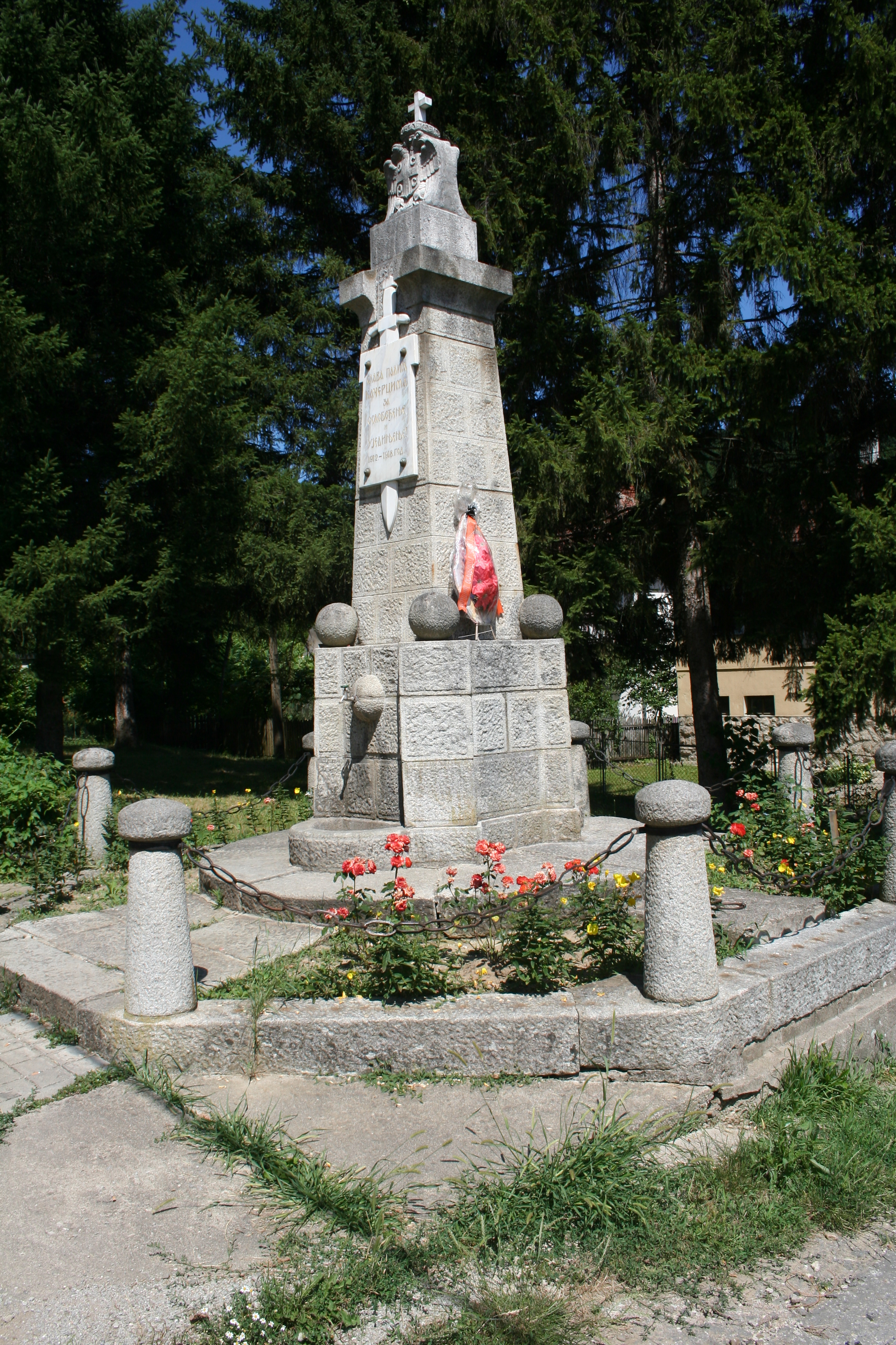 Spomenik učesnicima ratova 1912-1918.